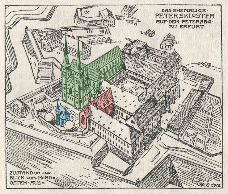 ehem. Benediktinerkloster St. Peter und Paul (Peterskloster) um 1800, Ansicht aus Nordosten